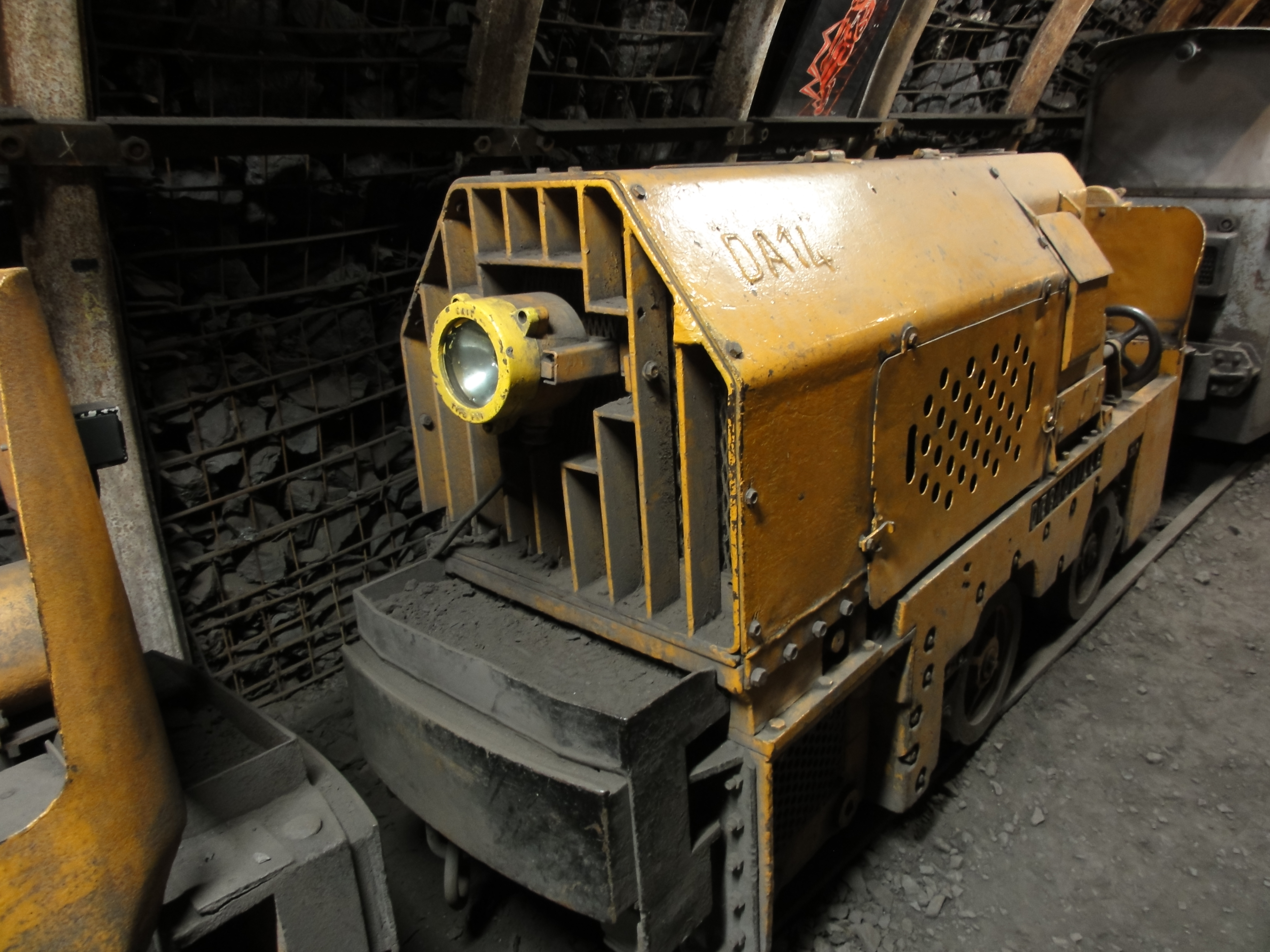 La Fosse Delloye de la Compagnie des mines d'Aniche était un charbonnage constitué de deux puits situé à Lewarde, Nord, Nord-Pas-de-Calais, France.Légende : néant.